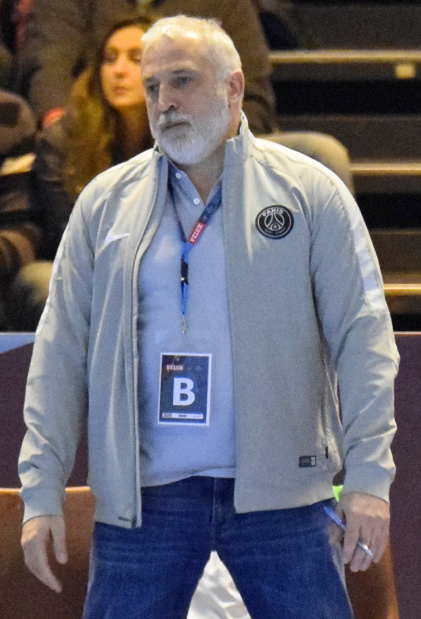 Rencontrede ligue des champions entre le PSG et l'US Dunkerque. A la Halle Carpentier (Paris), le 22 mars 2015.